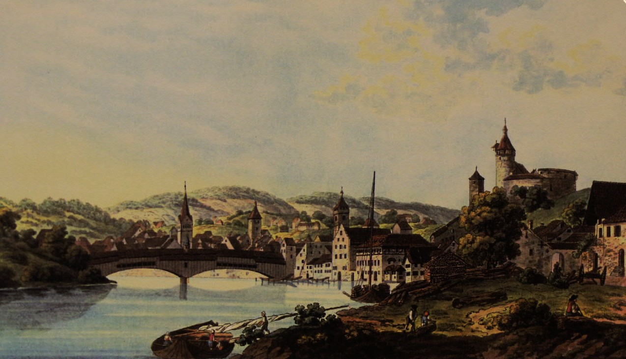 Blick auf Schaffhausen mit der Grubenmann-Brücke.